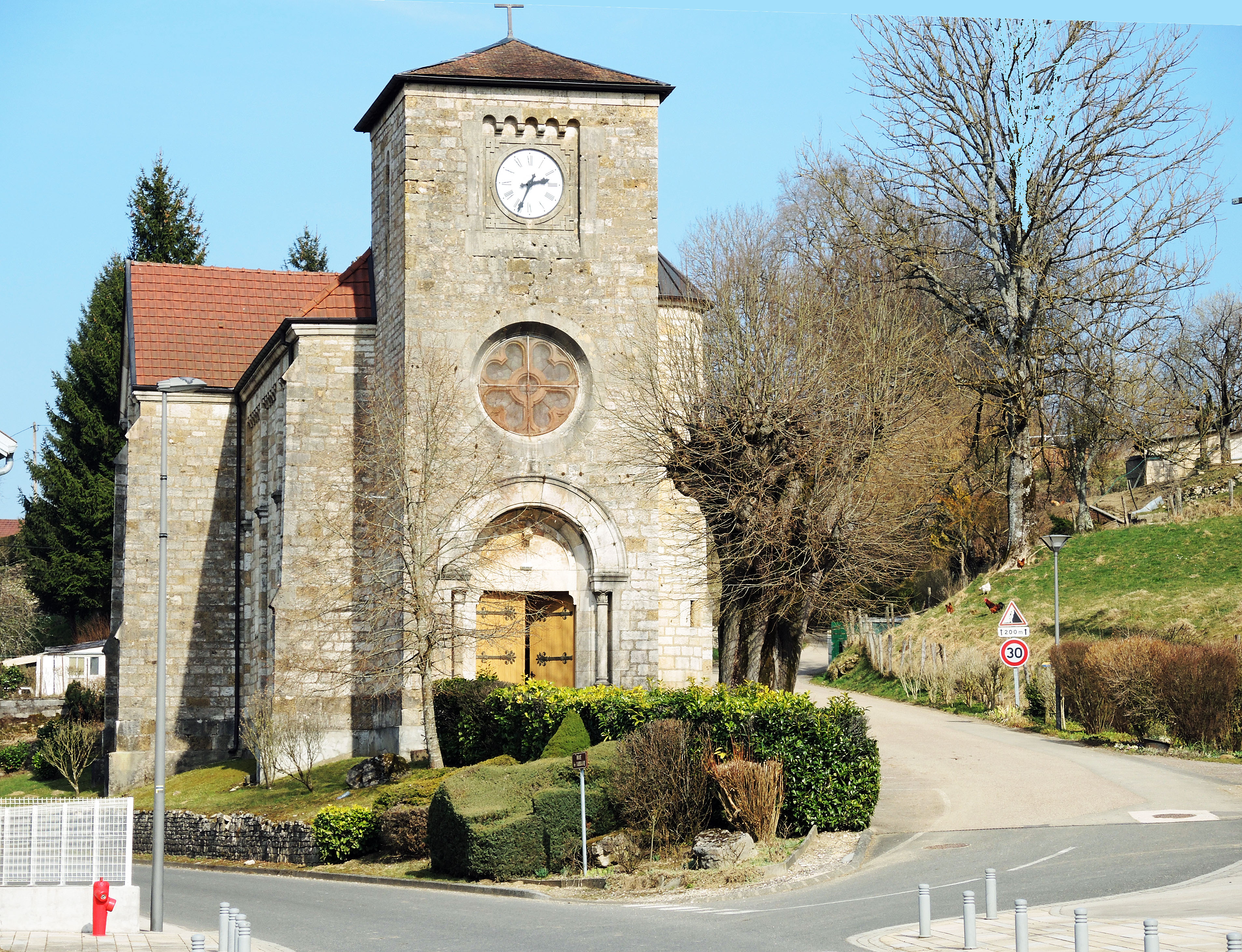 Eglise d'Appenans. Département du Doubs.